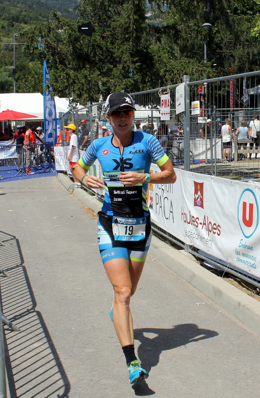 Carrie Lester Embunman 2017